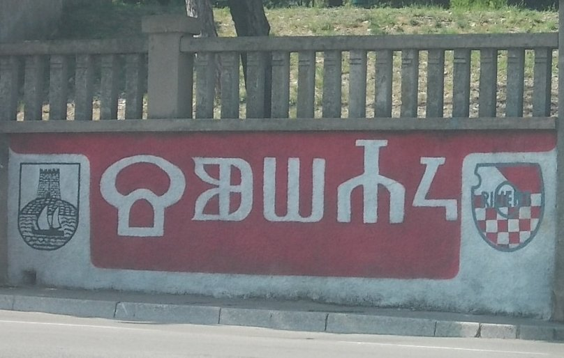 sušak in glagolitic letters, foud in Rijeka Sušak u glagoljskim slovima, pronađen u Rijeci